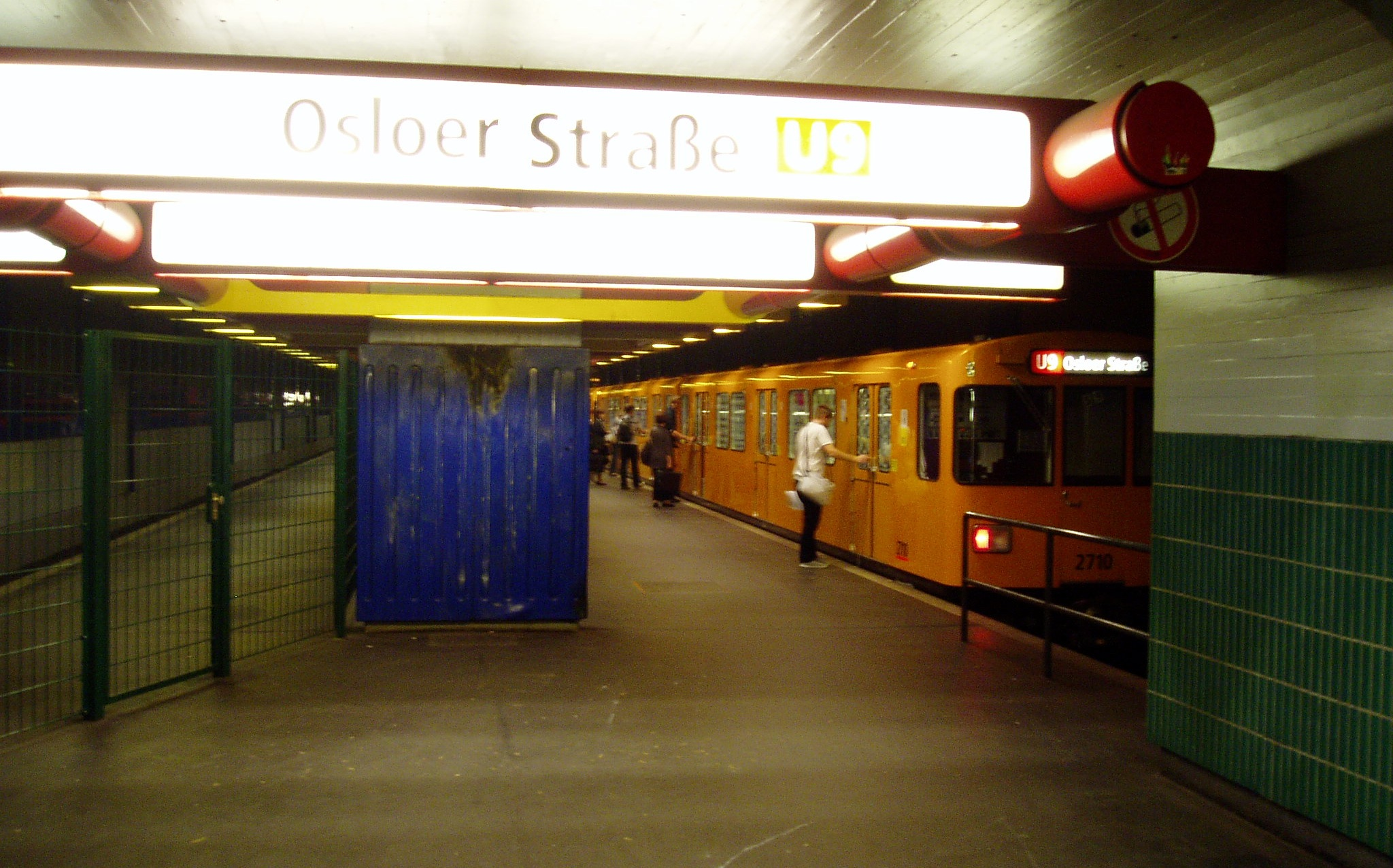 Berlin U-Bahnhof Schloßstraße, U9 nach Osloer Straße (Slo)